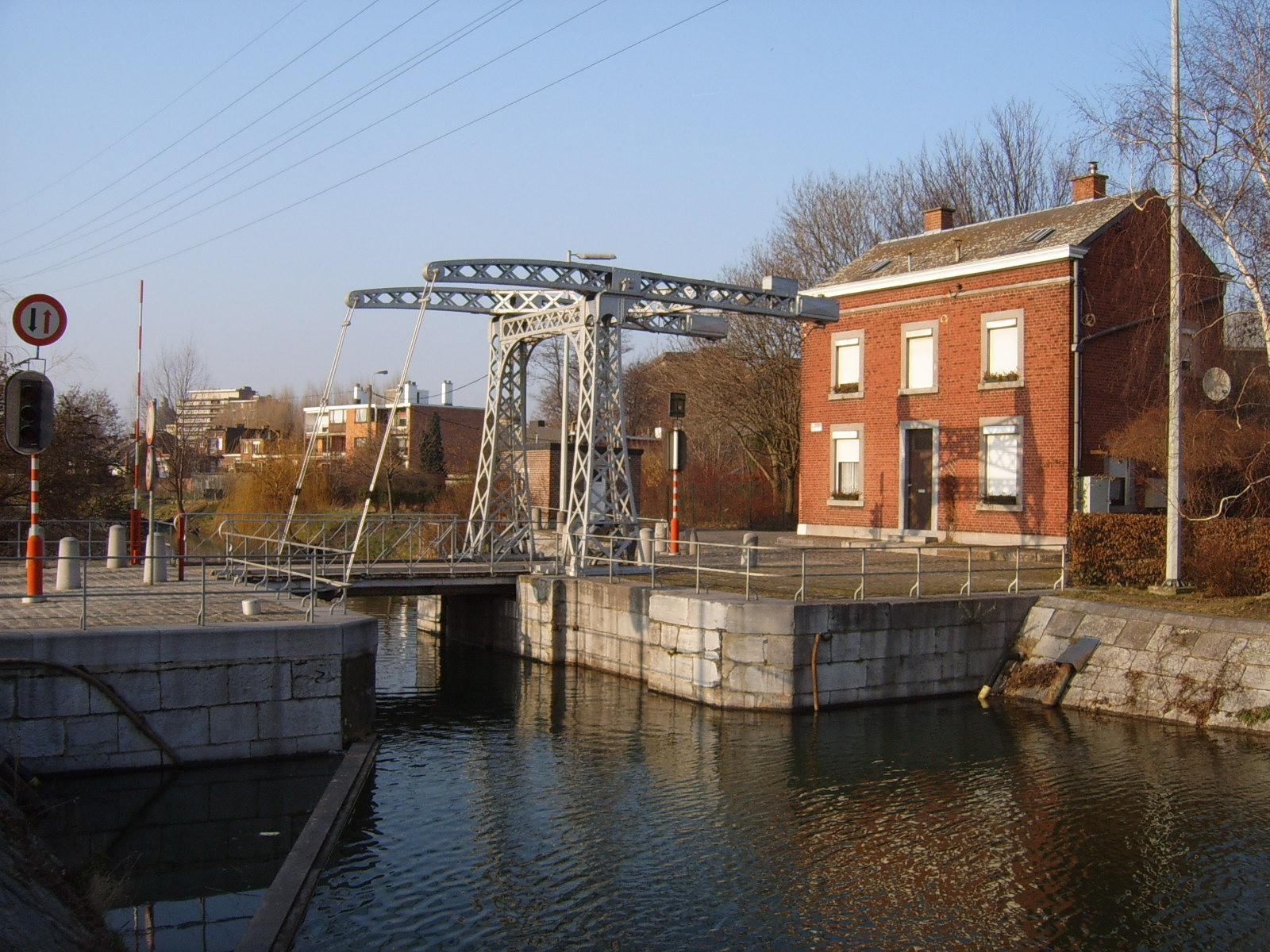 Bridge on canal de l'Ourthe, Liège Personnal picture, I set it in public domain